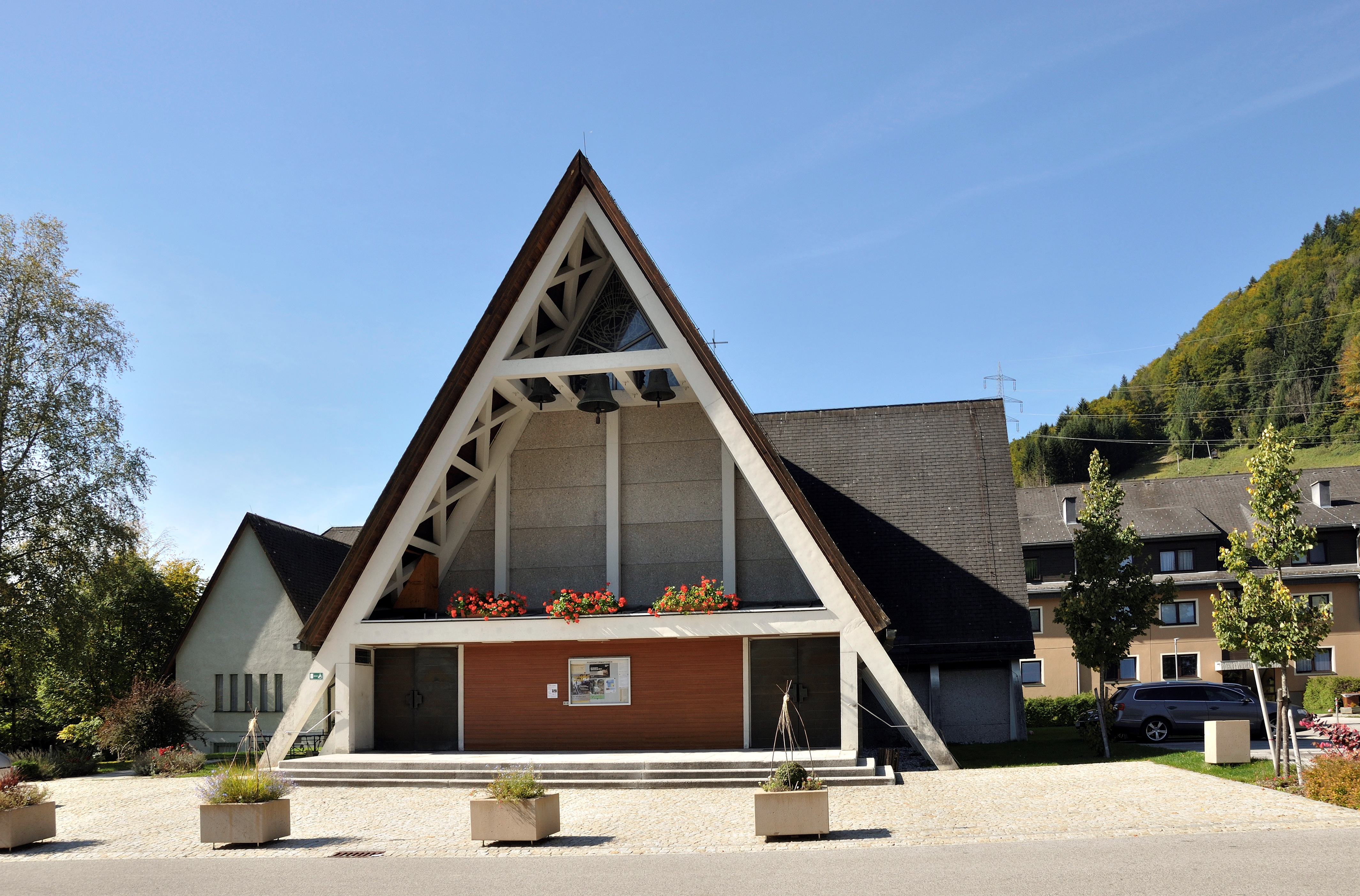 Kath. Pfarrkirche Christi Himmelfahrt